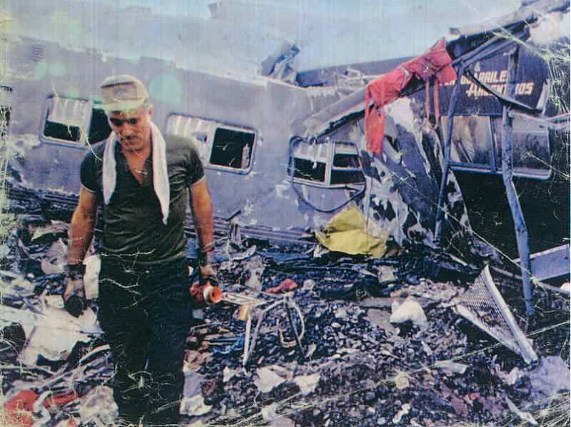 Rescatista luego del choque.